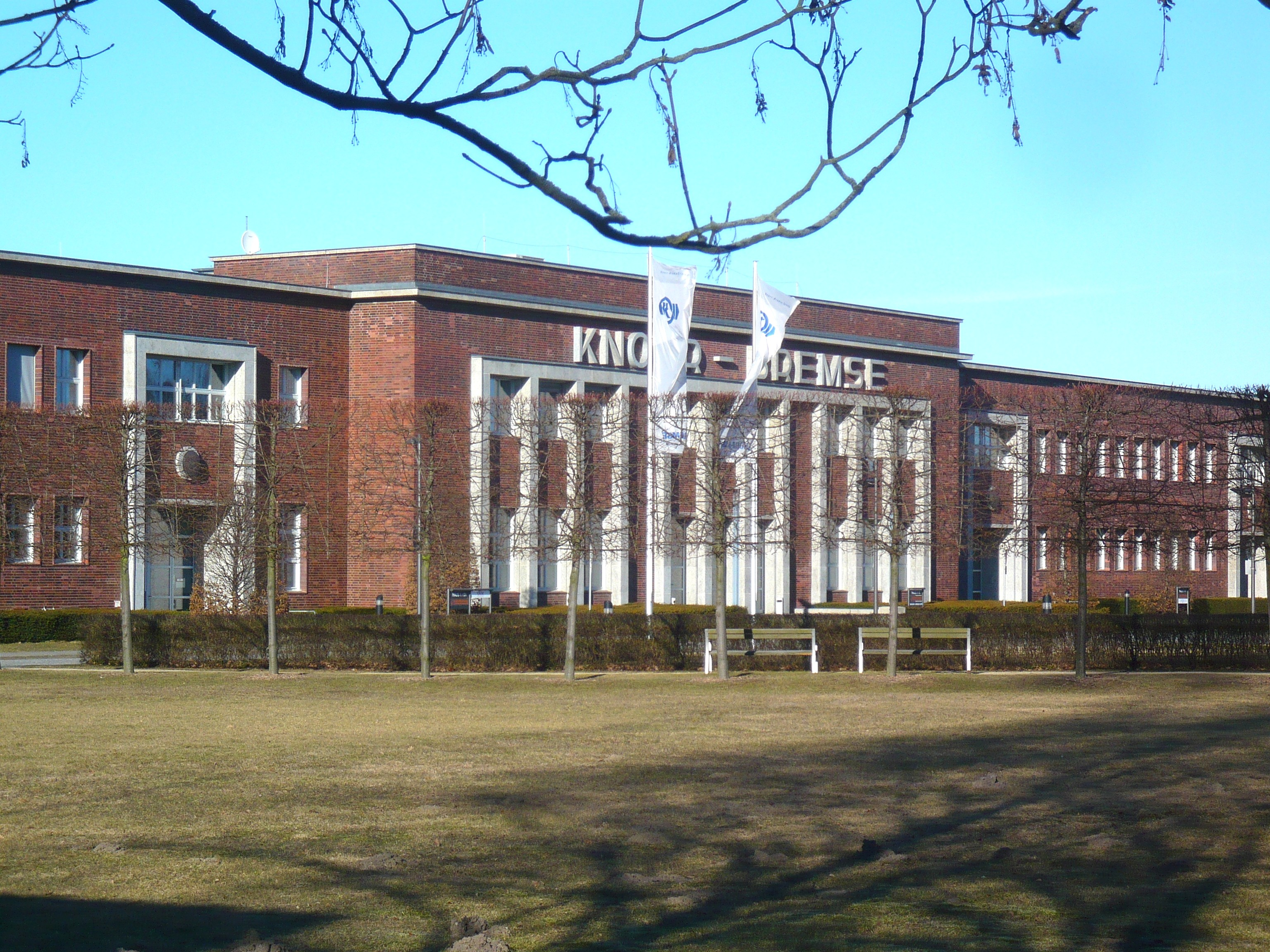 Ortsteil Berlin-Marzahn:Georg-Knorr-Str./ Werk Knorr-Bremse